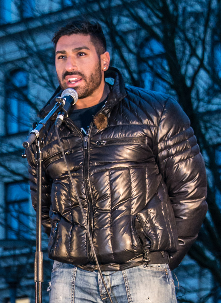 Sent på fredagseftermiddagen den 27 februari 2015 hölls en manifestation utanför Stockholms synagoga där deltagarna bildade en fredsring. Talare var bland annat Siavosh Derakhti.